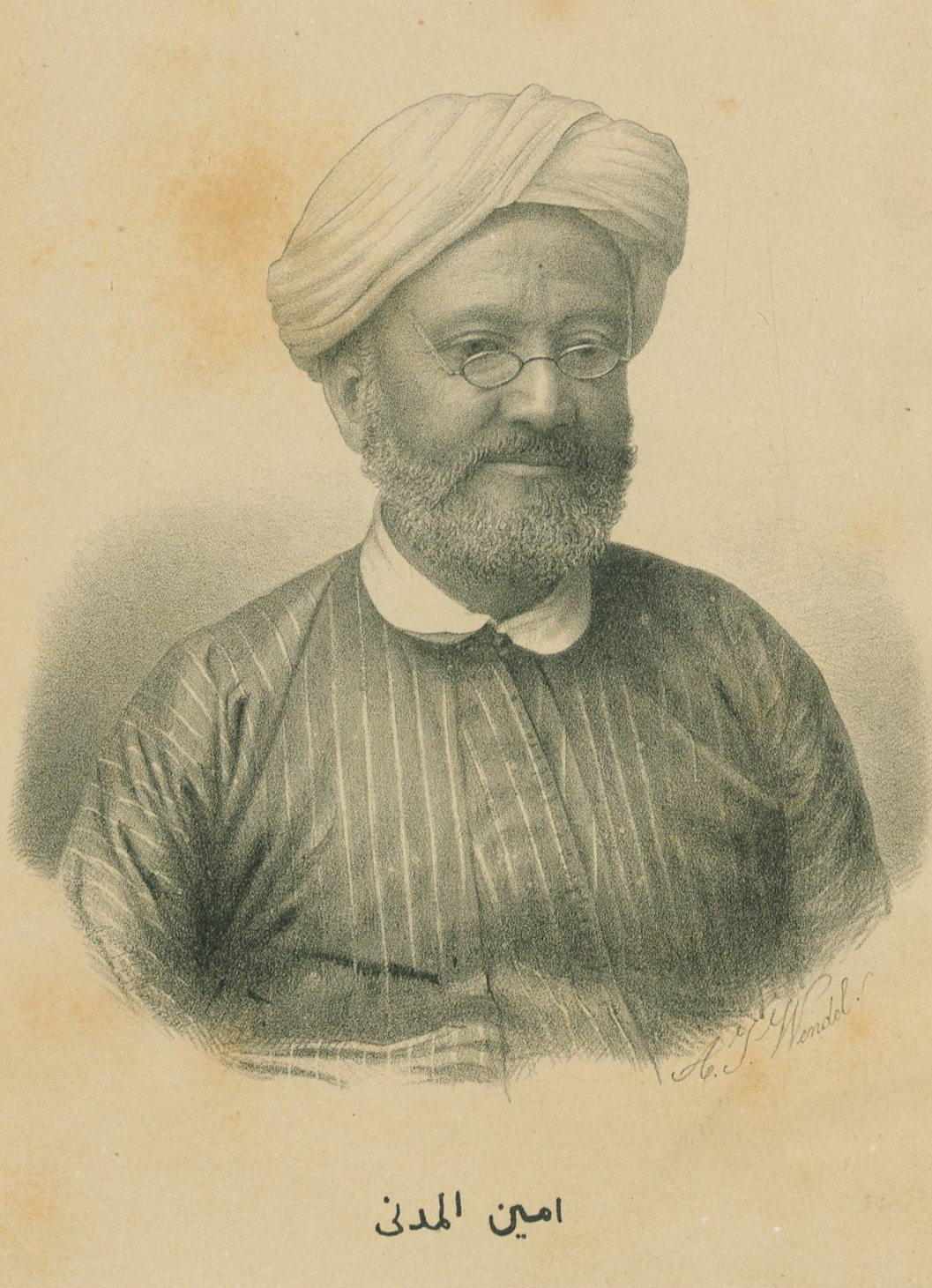 Amin ibn Hasan al-Halawani al-Madani al-Hanafi, in het westen beter bekend als al-Madani of Amin b. Hasan al-Madani, bezocht Leiden in 1883. De firma Brill kocht zijn collectie van ongeveer 600 manuscripten.